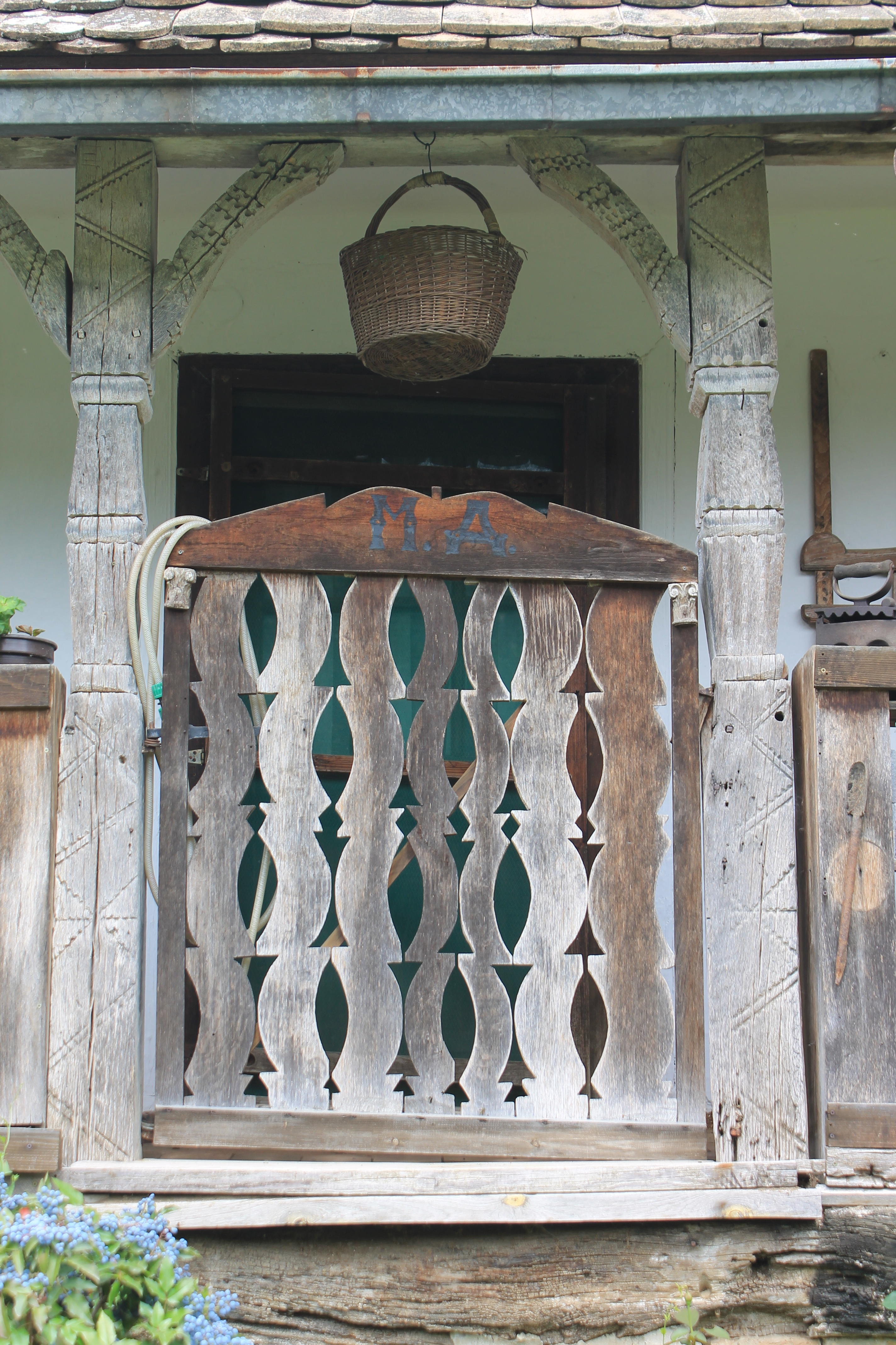 Kuća u Ljubi